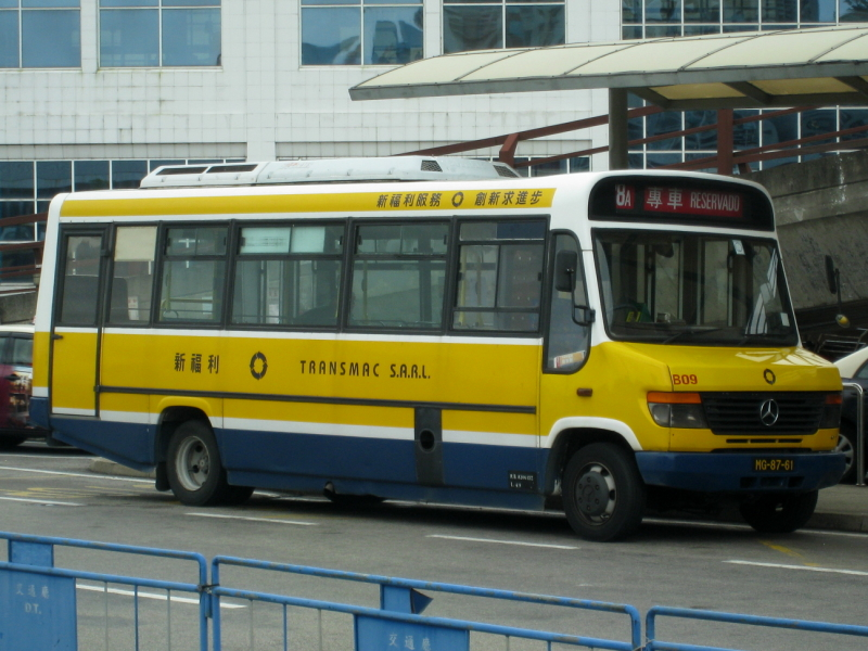 Transmac_SARL_B09 澳門新福利巴士